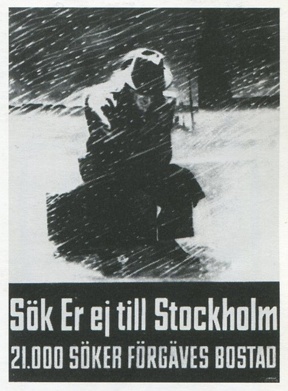 Affisch som varnar för bostadsbristen i Stockholm efter andra världskriget